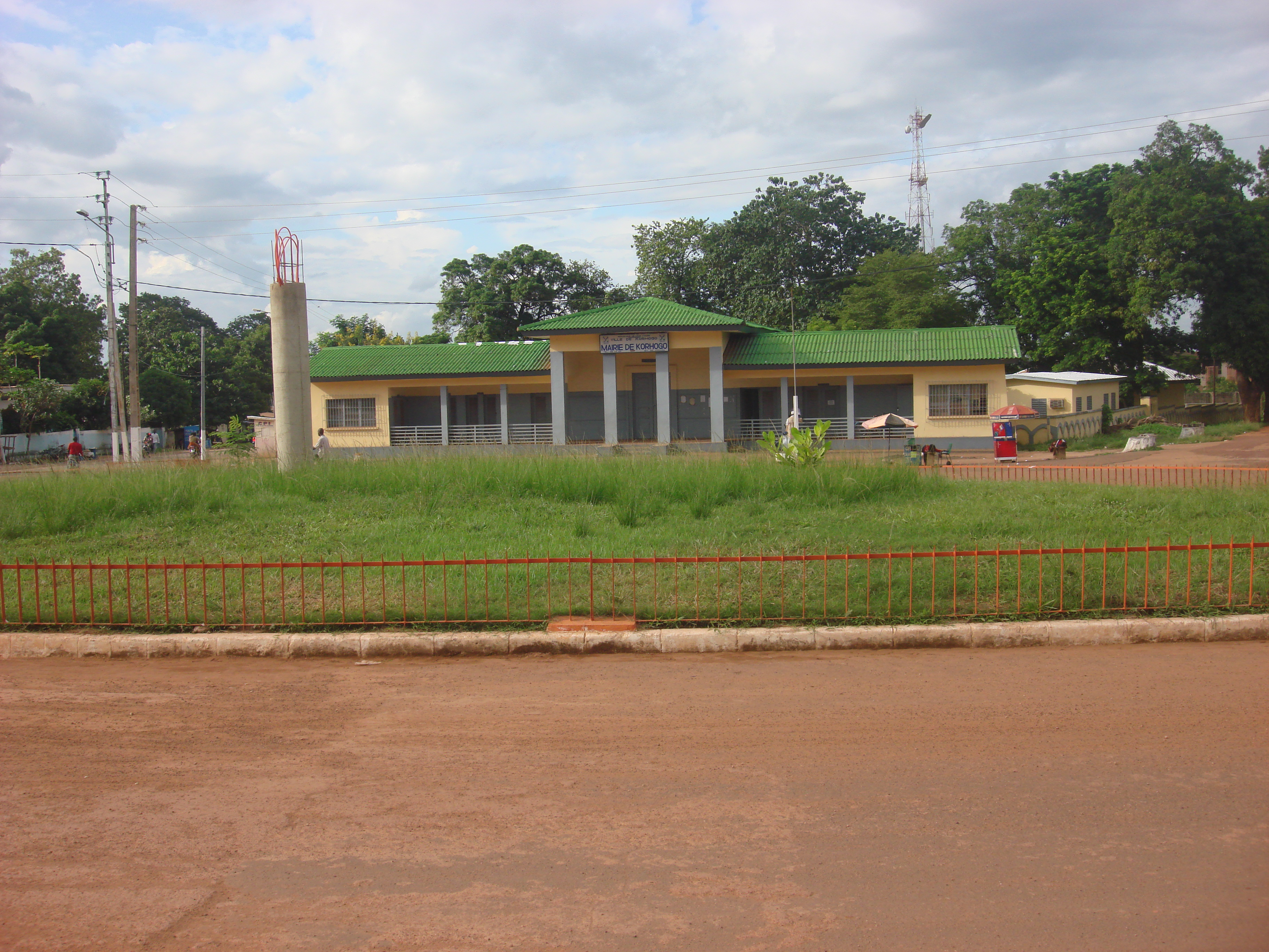 Mairie de Korhogo, Côte d'Ivoire